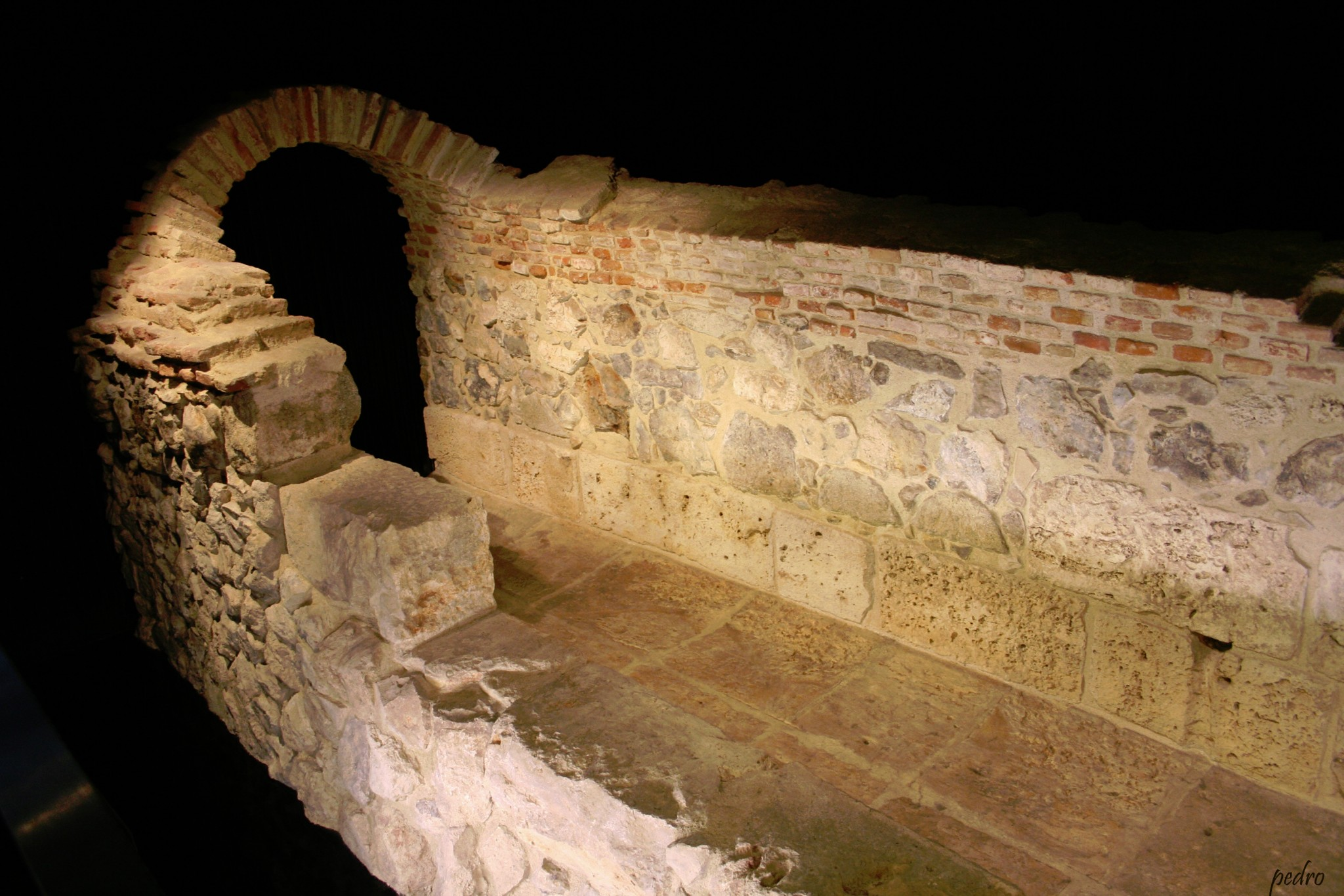 Restos Arqueologicos Caños del Peral (5)